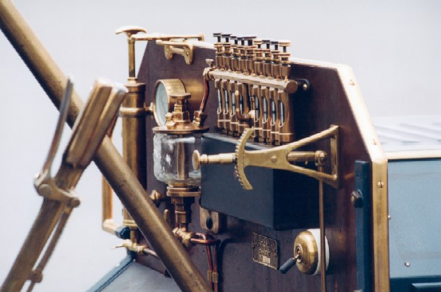 Mercedes-Simplex, Handbremshebel fuer die hinteren Trommelbremsen, Lenksaeule, Abgas-Klappenregler und "Schmiertrompete".